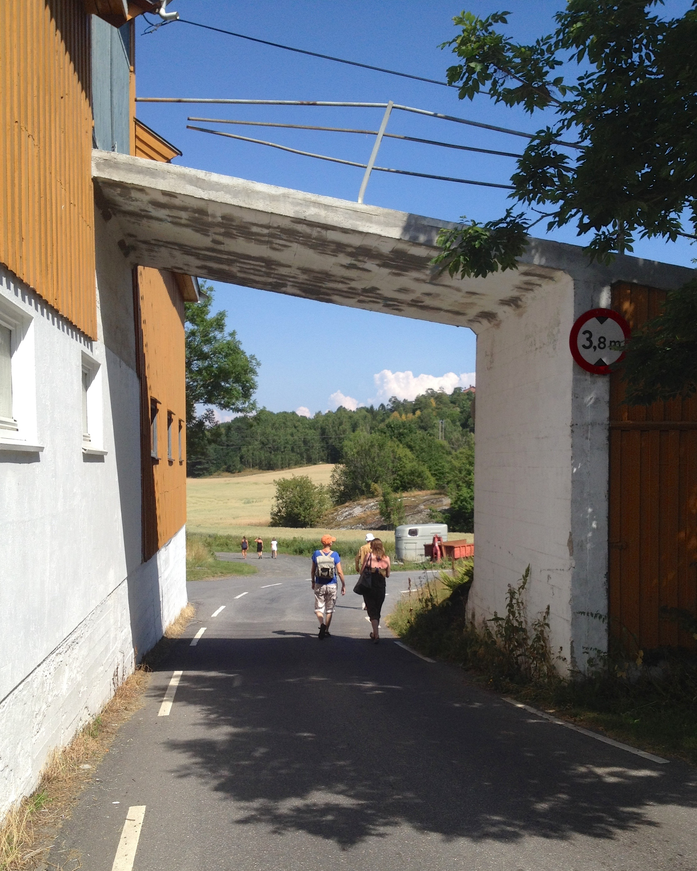 Along Eftangsveien